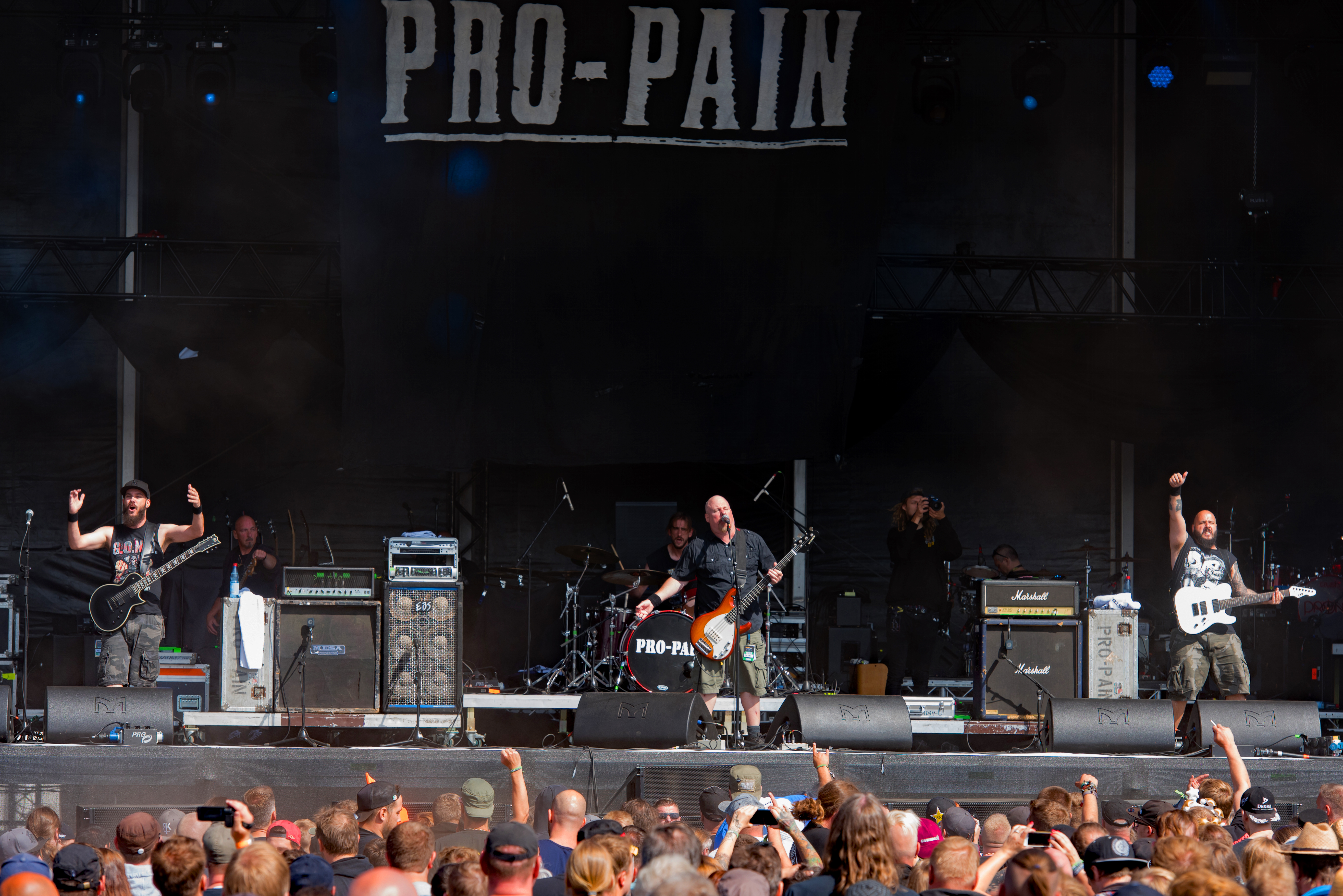 Pro-Pain auf dem Reload Festival 2018